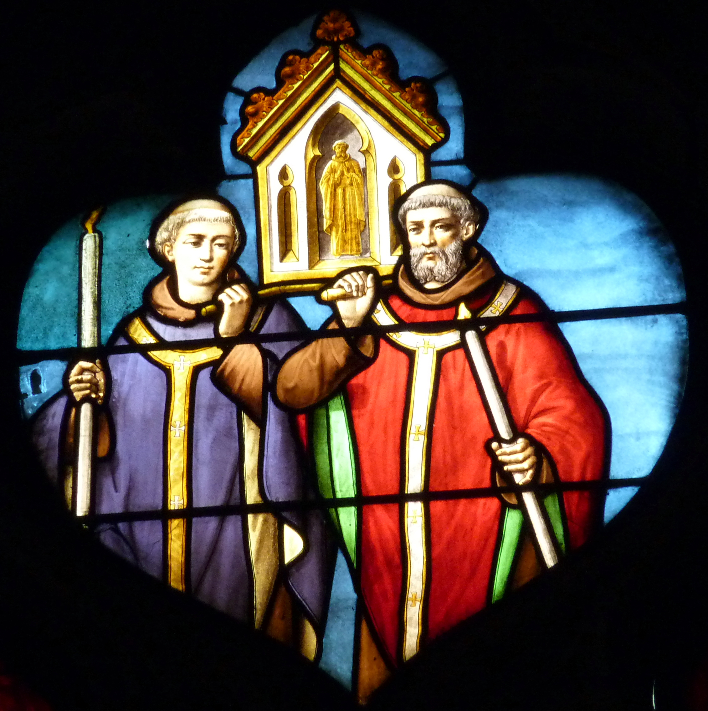 Bleiglasfenster (Ausschnitt) in der katholischen Pfarrkirche Notre-Dame-des-Vertus in Aubervilliers, Darstellung:Prozession mit einer Reliquie